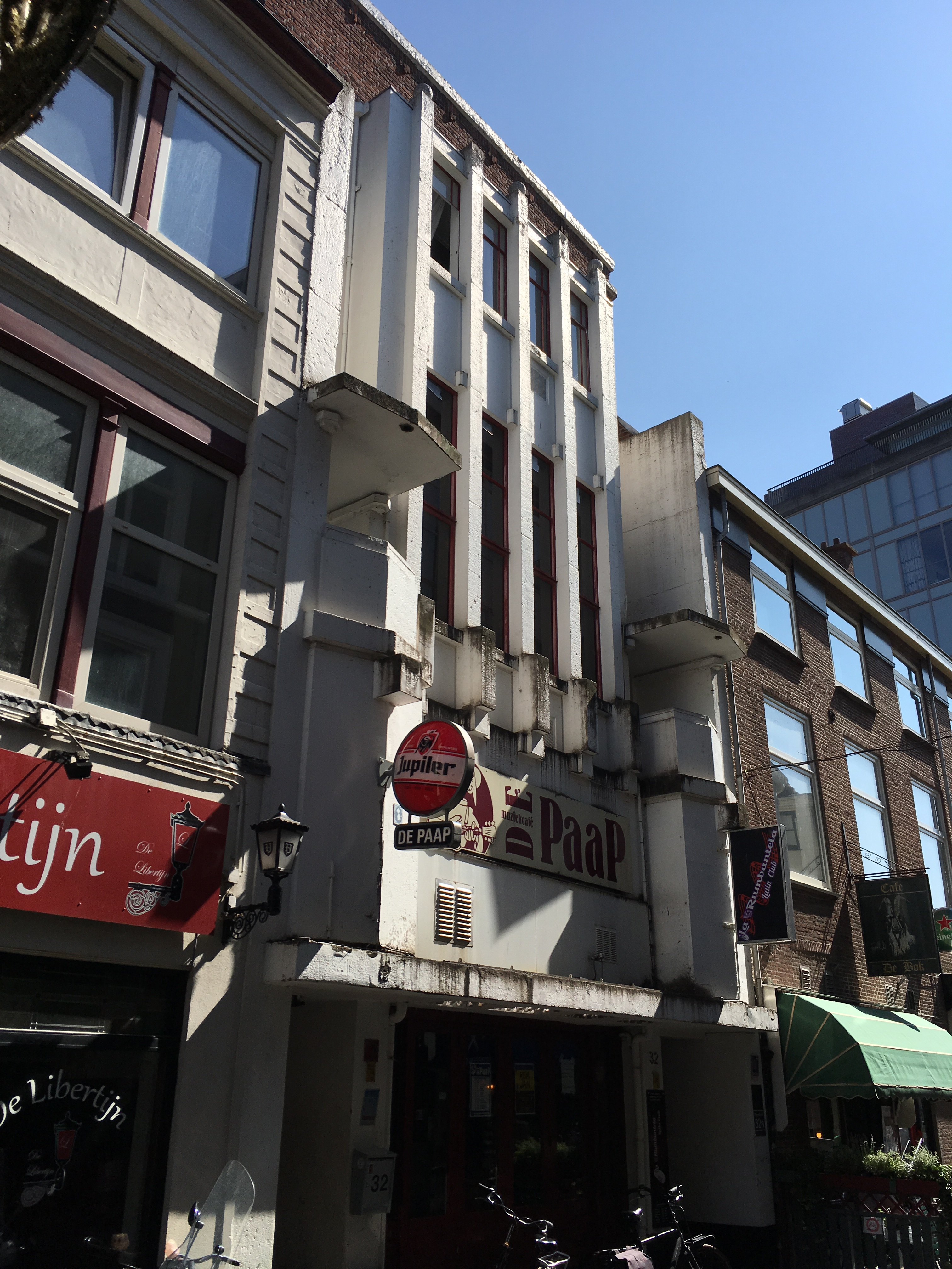 Foto van muziekcafé De Paap aan de Papestraat 32, 2513 AW Den Haag